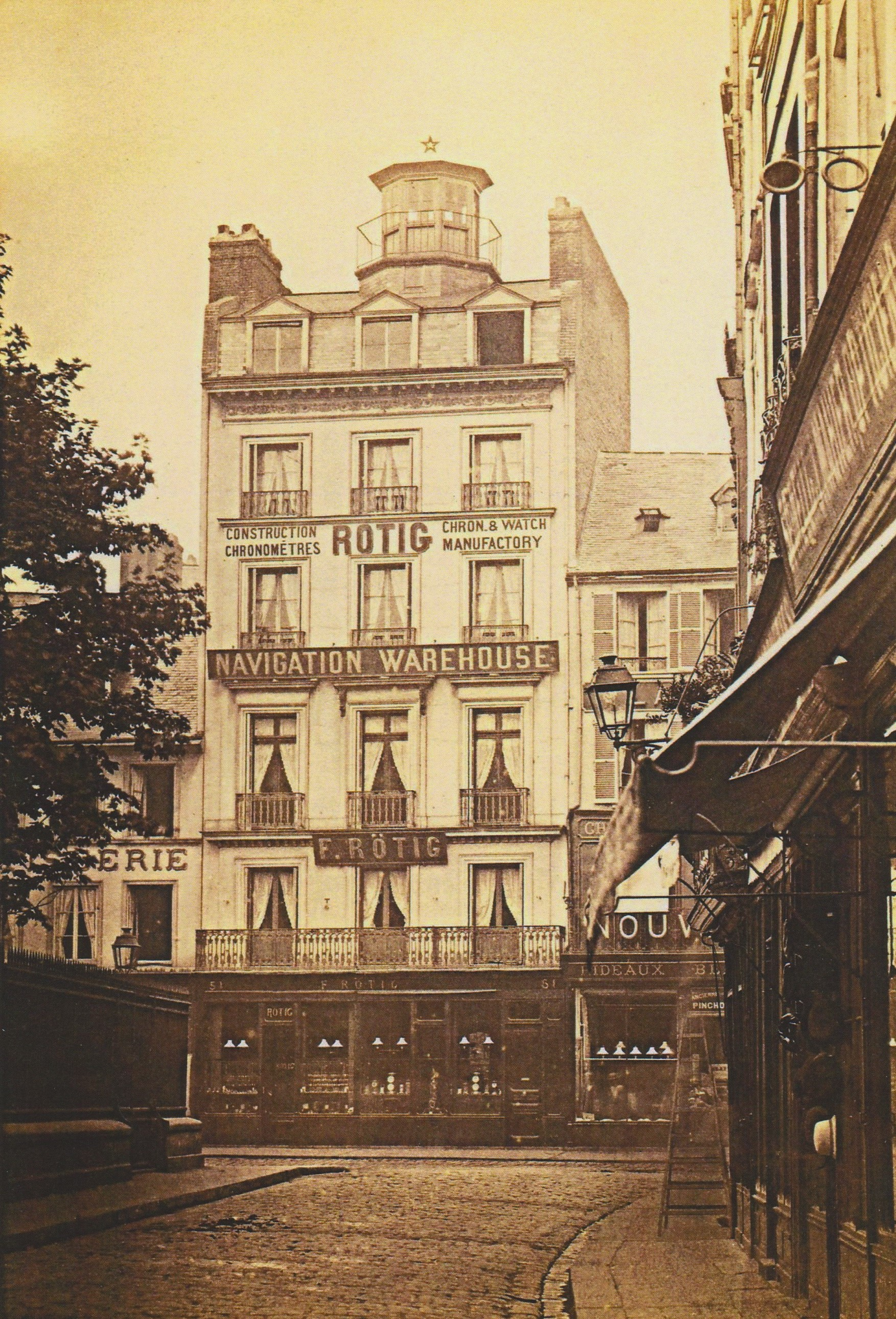 Immeuble du 51 rue de Paris au Havre (à hauteur de la cathédrale Notre-Dame), qui fut l'adresse de l'horlogerie de Frédéric Rötig au moins de 1865 à 1892.